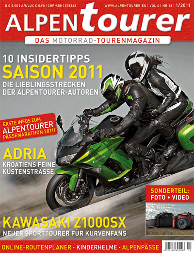 ALPENTOURER Titel 1/2011